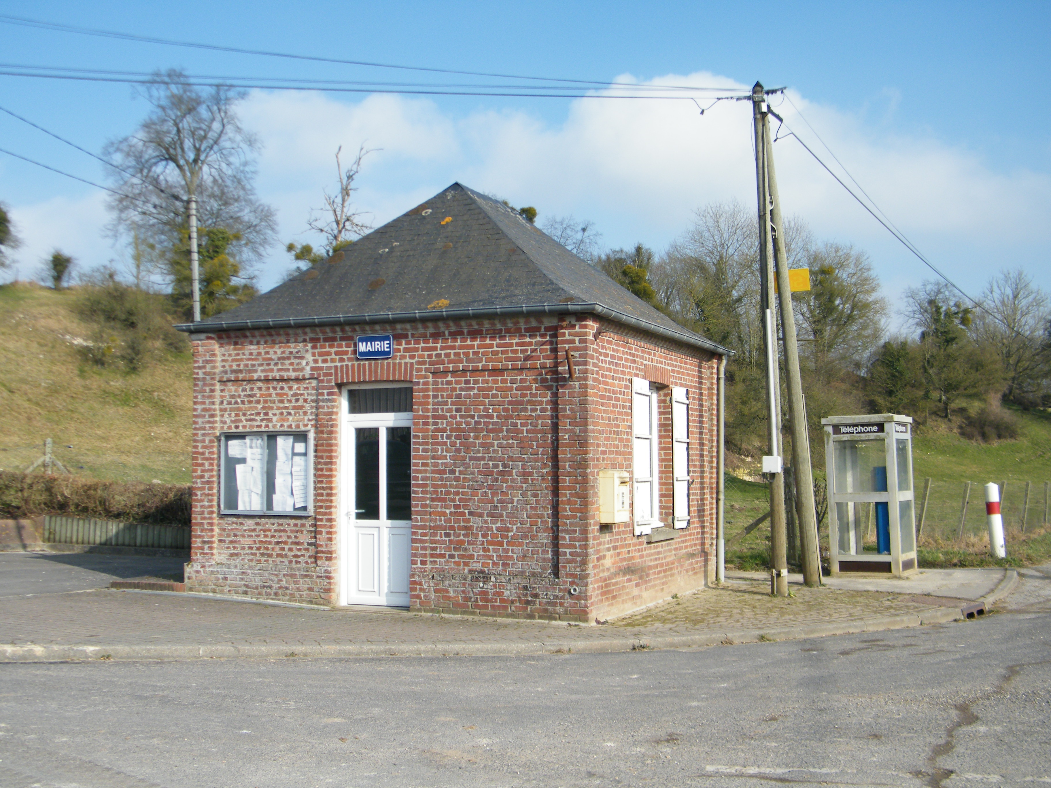 Mairie.